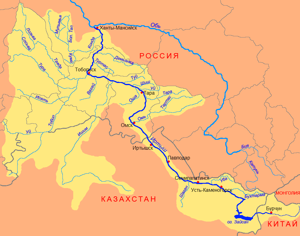 Схема бассейна реки Иртыш